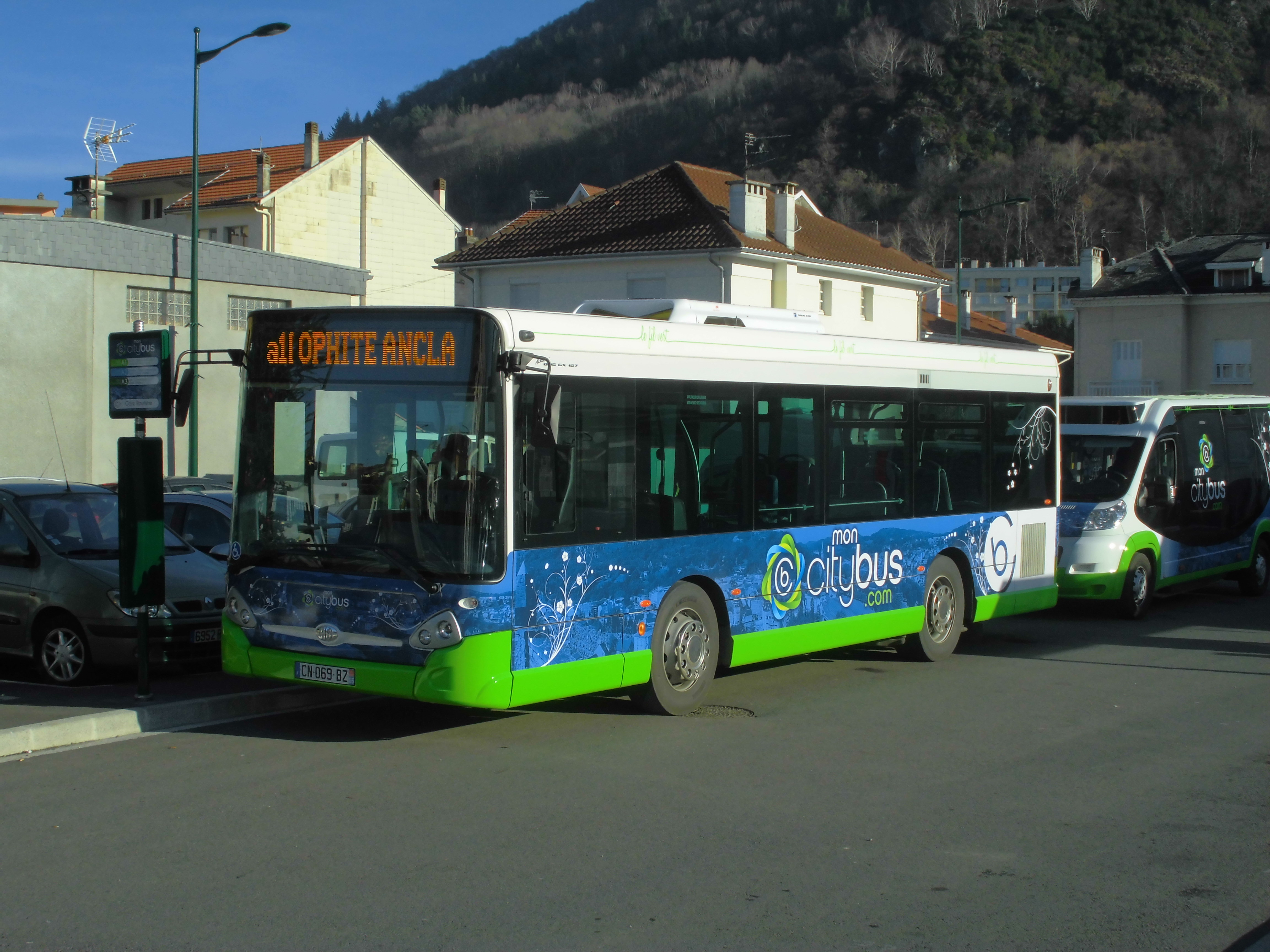 HeuliezBus GX127C au terminus Gare Routière de Lourdes sur la ligne a1.